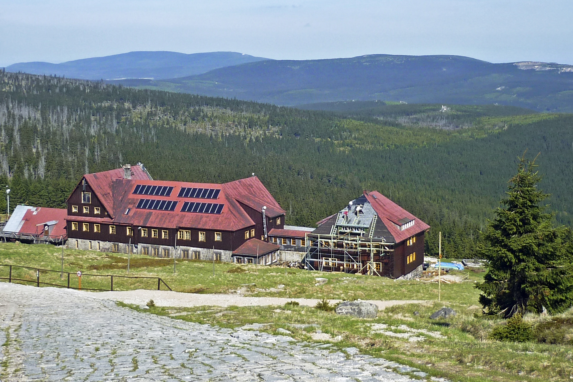 Neue Schlesische Baude im Riesengebirge